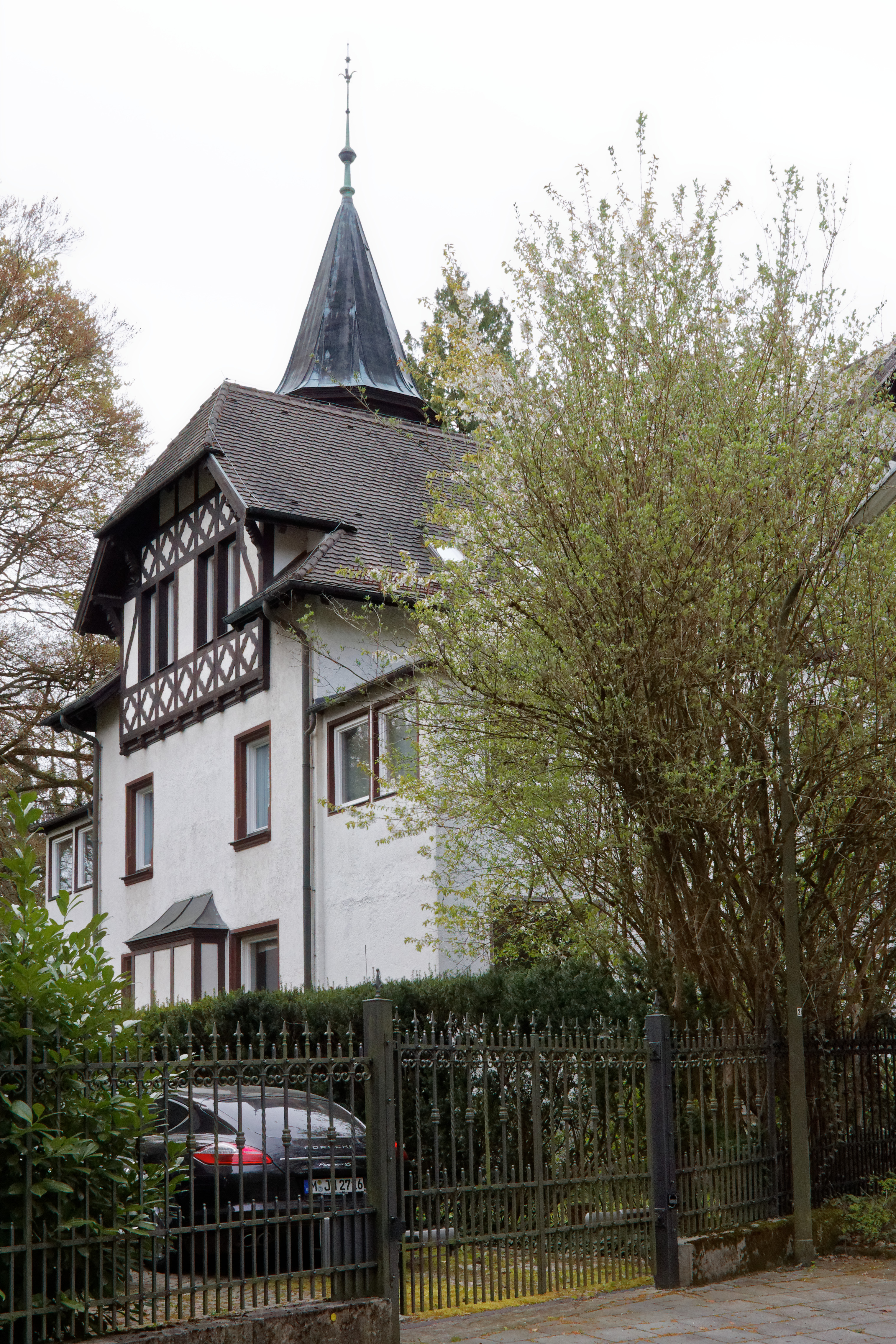 Villa Borscht in der Heilmannstraße 33 in München